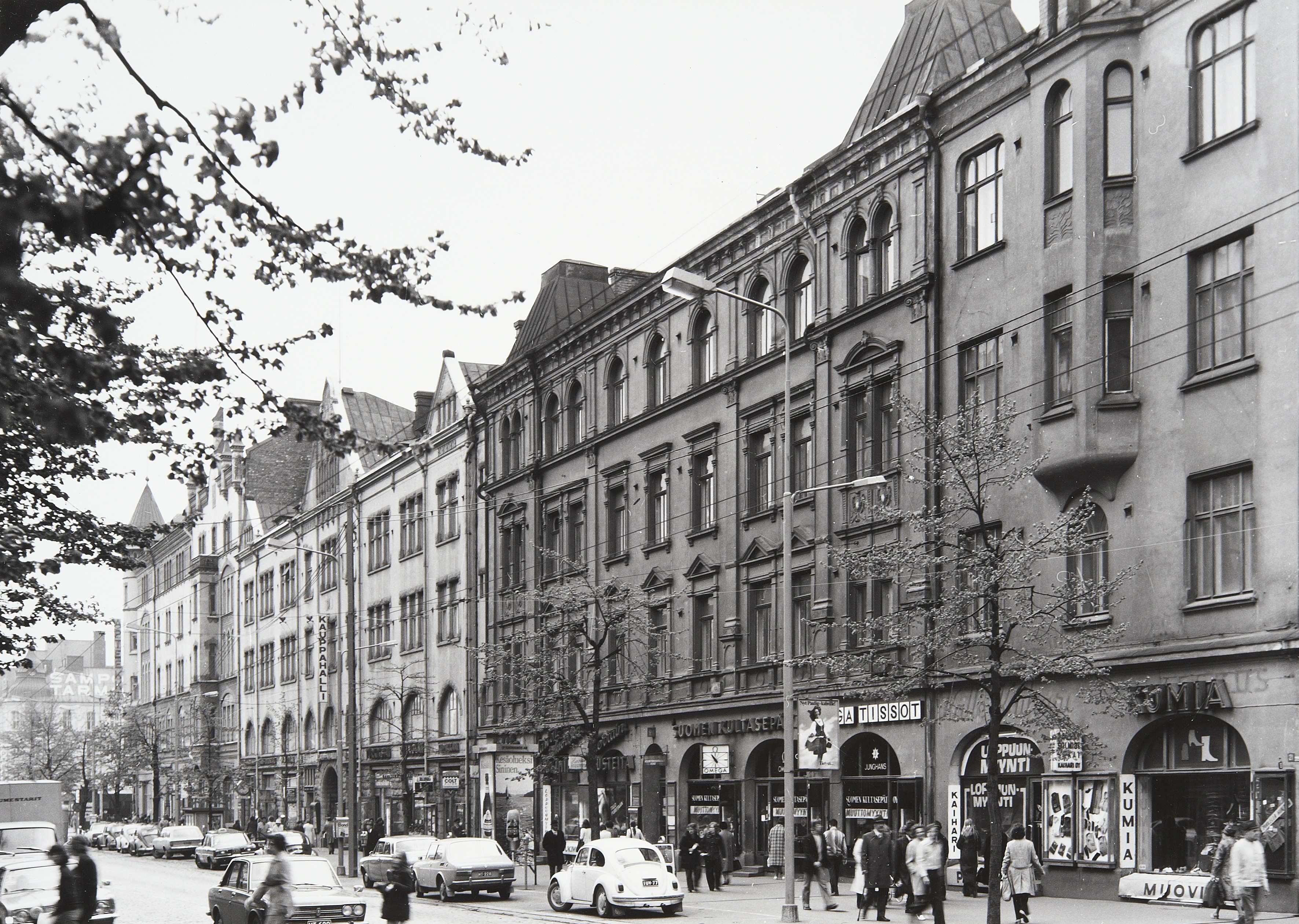 Hämeenkadun kiirettä, vas. Commercen talo, veressä kauppahallin virastotalo. Oikeassa reunassa Pulla-Helinin talo.